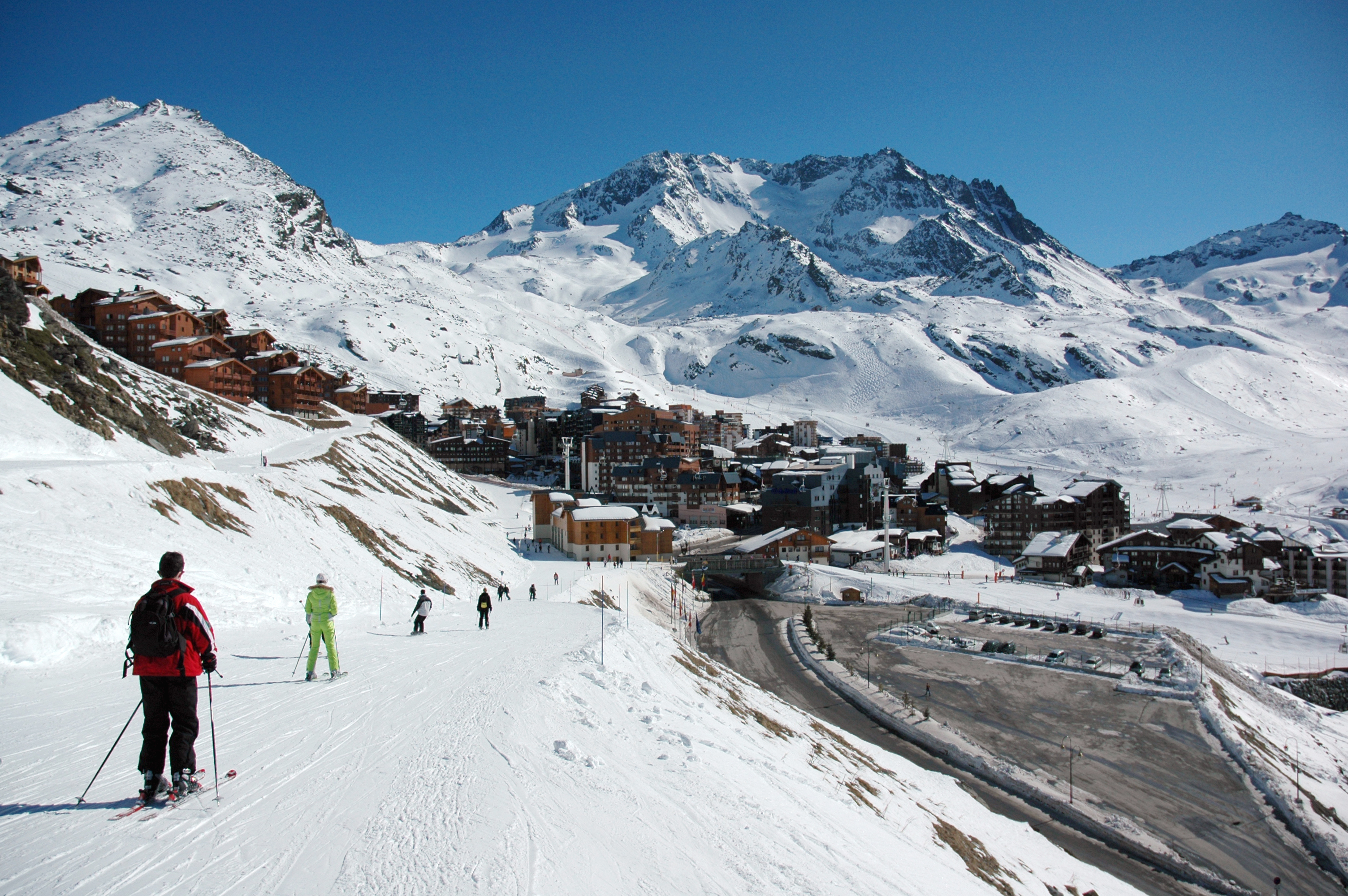 Val Thorens, Les Trois Vallées, Frankrijk